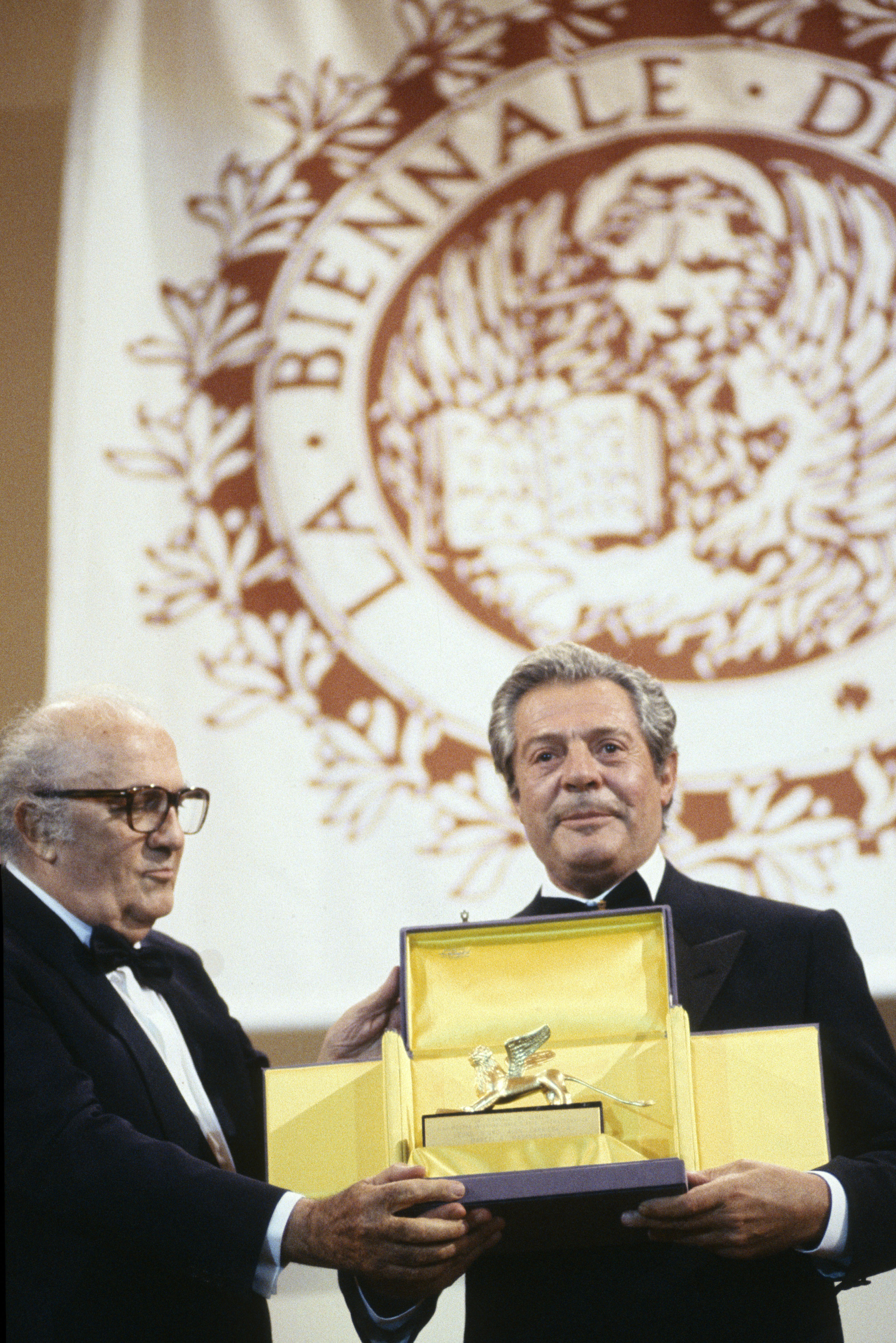 federico fellini consegna a marcello mastroianni ileone d'oro alla carriera durante la Mostra del cinema di Venezia del 1990